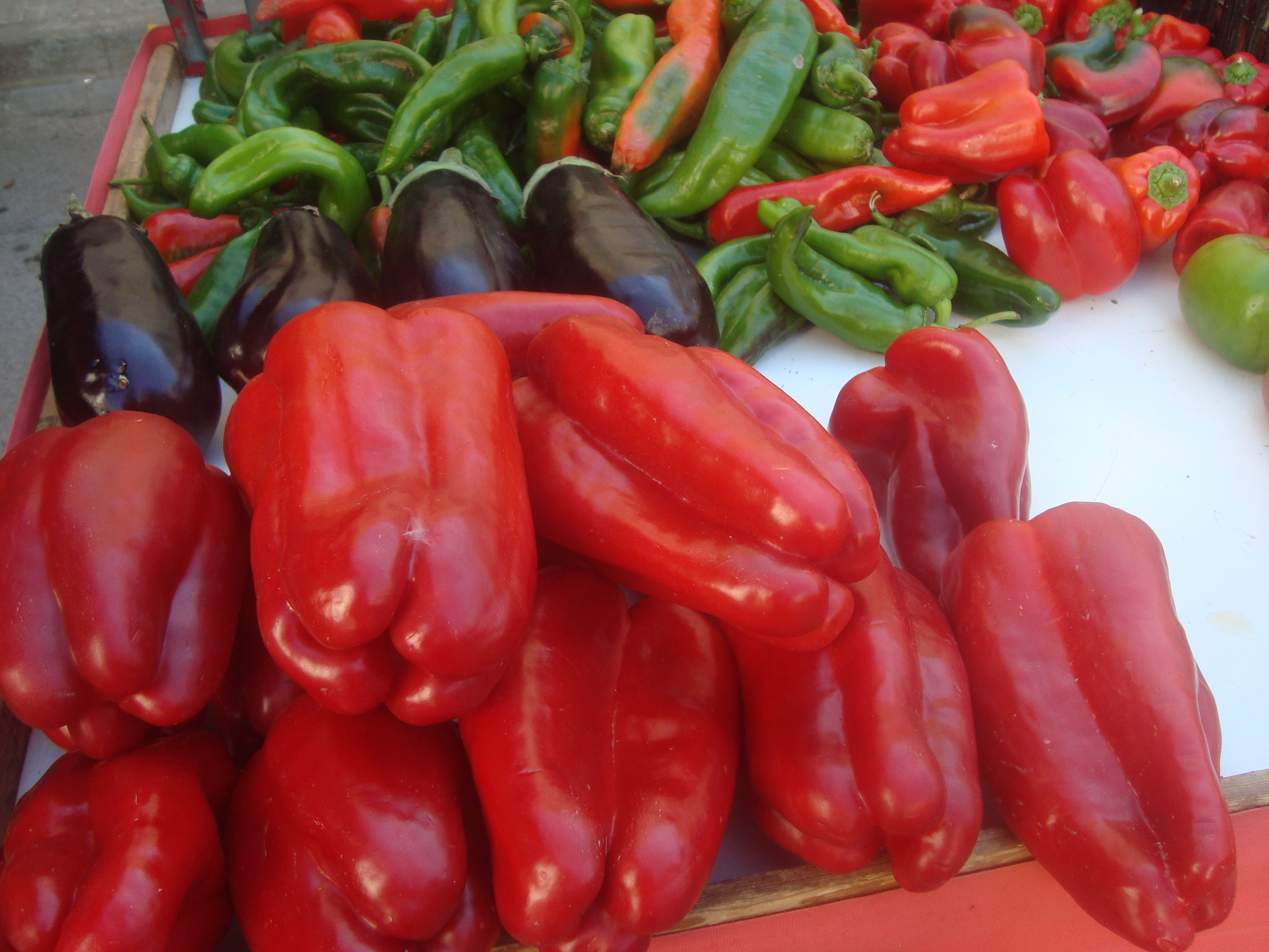 Pimientos rojos, origen Castellón.